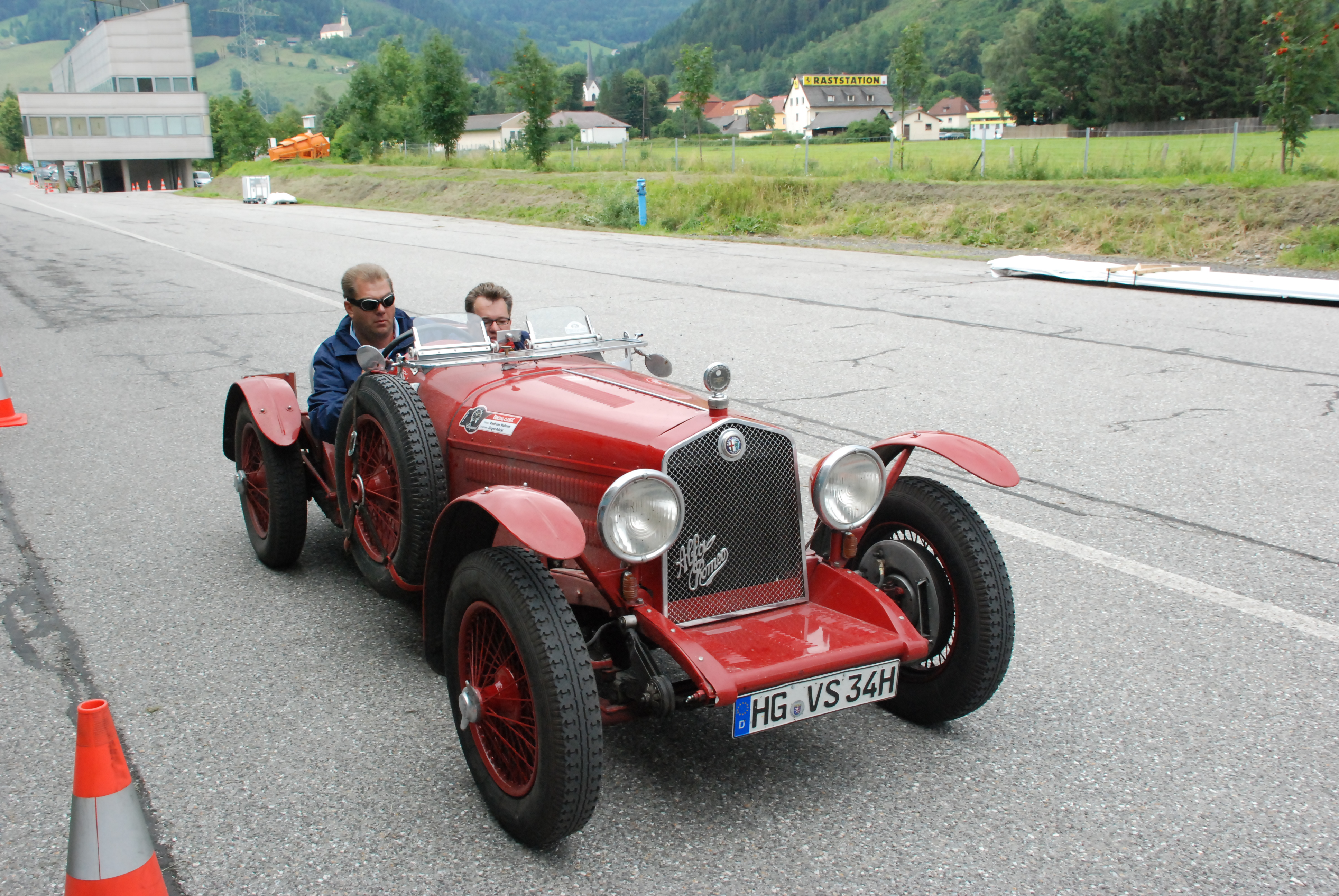 Alfa Romeo 6C 2300 Pescara, Baujahr 1934, bei der Ennstal-Classic 2008